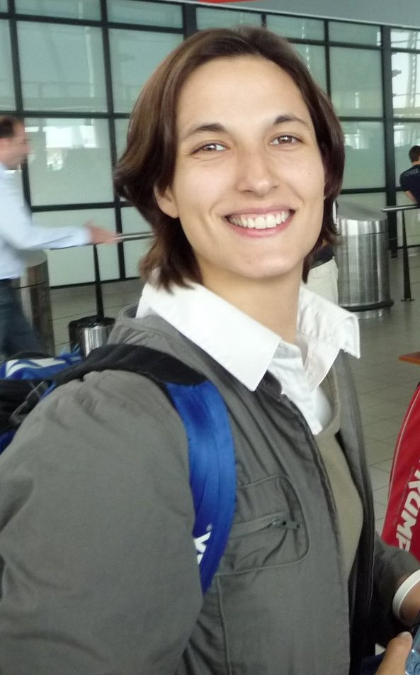 Joueuse Internationale de Badminton